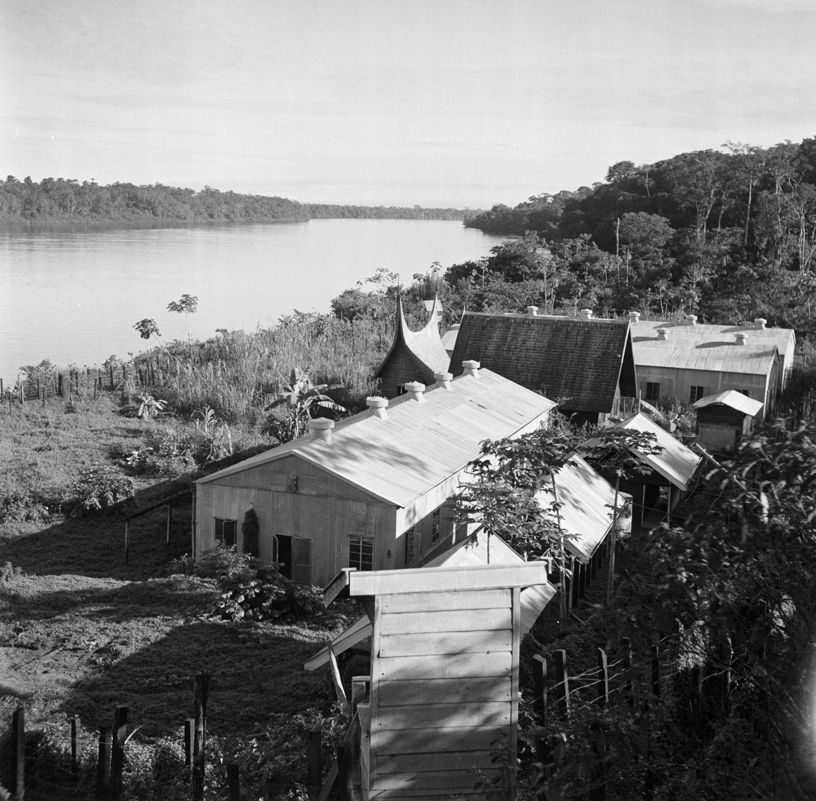 Collectie / Archief : Fotocollectie Van de Poll Reportage / Serie : Reis naar Suriname en de Nederlandse Antillen Beschrijving : De voormalige Jodensavanna aan de Surinamerivier in Suriname Annotatie : De Jodensavanna was in de 17de en 18de eeuw de zetel der Portugese Joodse Natie in Suriname. Van 1942 tot 1946 was het een interneringskamp voor NSB-ers uit Nederlands-Indië Datum : 1947 Locatie : Suriname Trefwoorden : interneringskampen, joodse religie, rivieren Fotograaf : Poll, Willem van de, [onbekend] Auteursrechthebbende : Nationaal Archief Materiaalsoort : Negatief (zwart/wit) Nummer archiefinventaris : bekijk toegang 2.24.14.02 Bestanddeelnummer : 252-6453